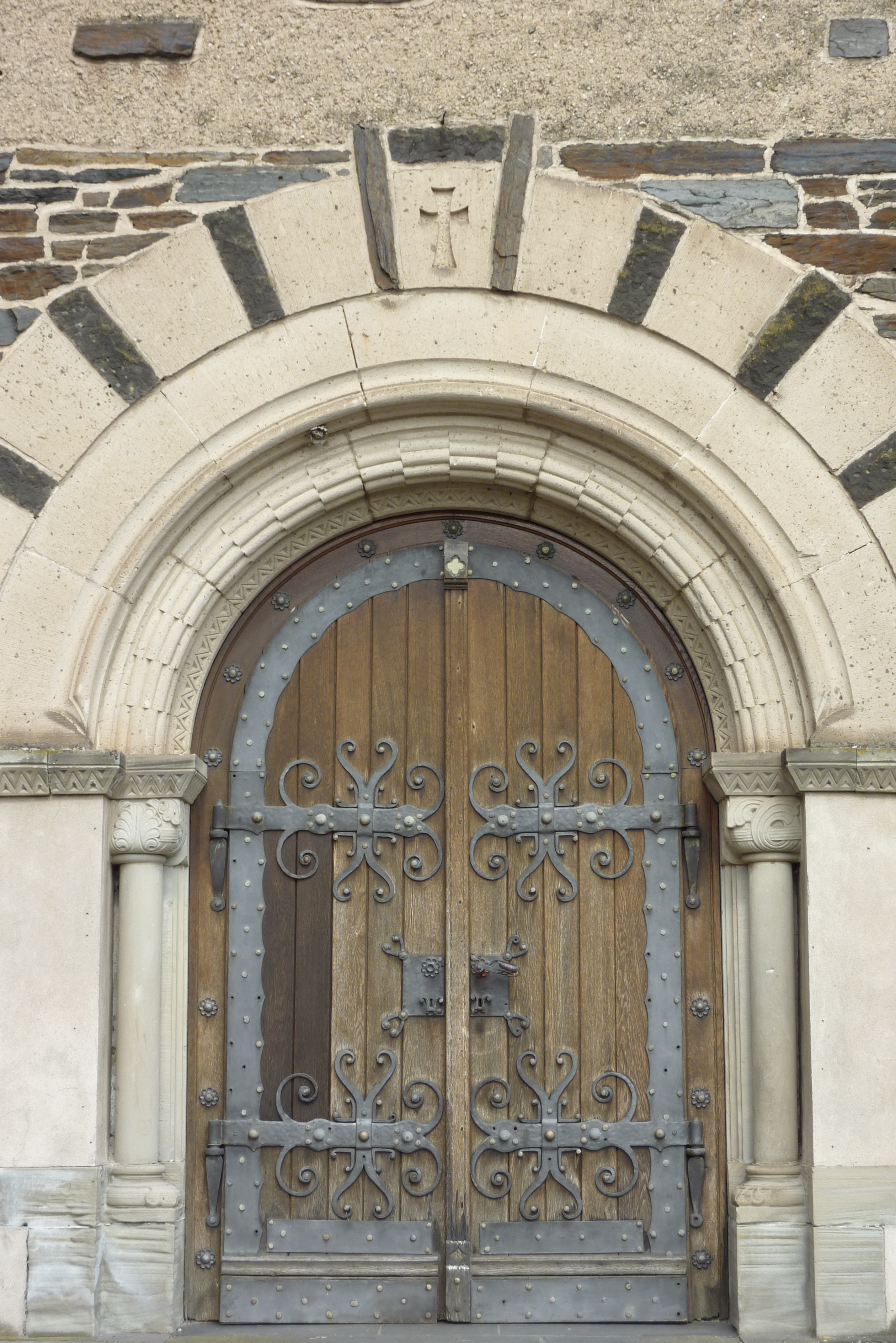 St. Nikolaus und Rochus in Mayschoß, Hauptportal Westseite